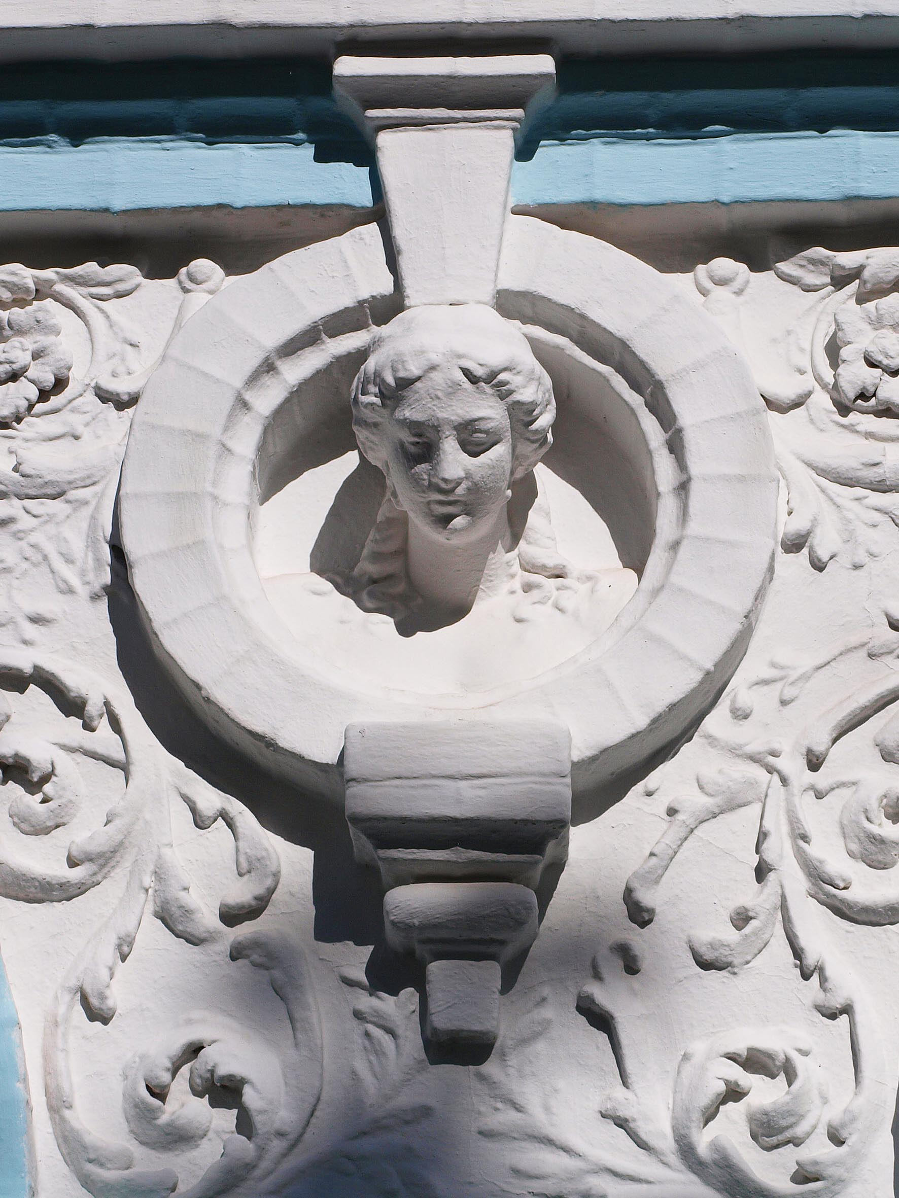 Декор дачі. Садиба О. Більського, в якій проживали радянські діячі, містився Київський НДІ педіатрії, акушерства та гінекології МОЗ УРСР, Київ, Герцена вул., 14.